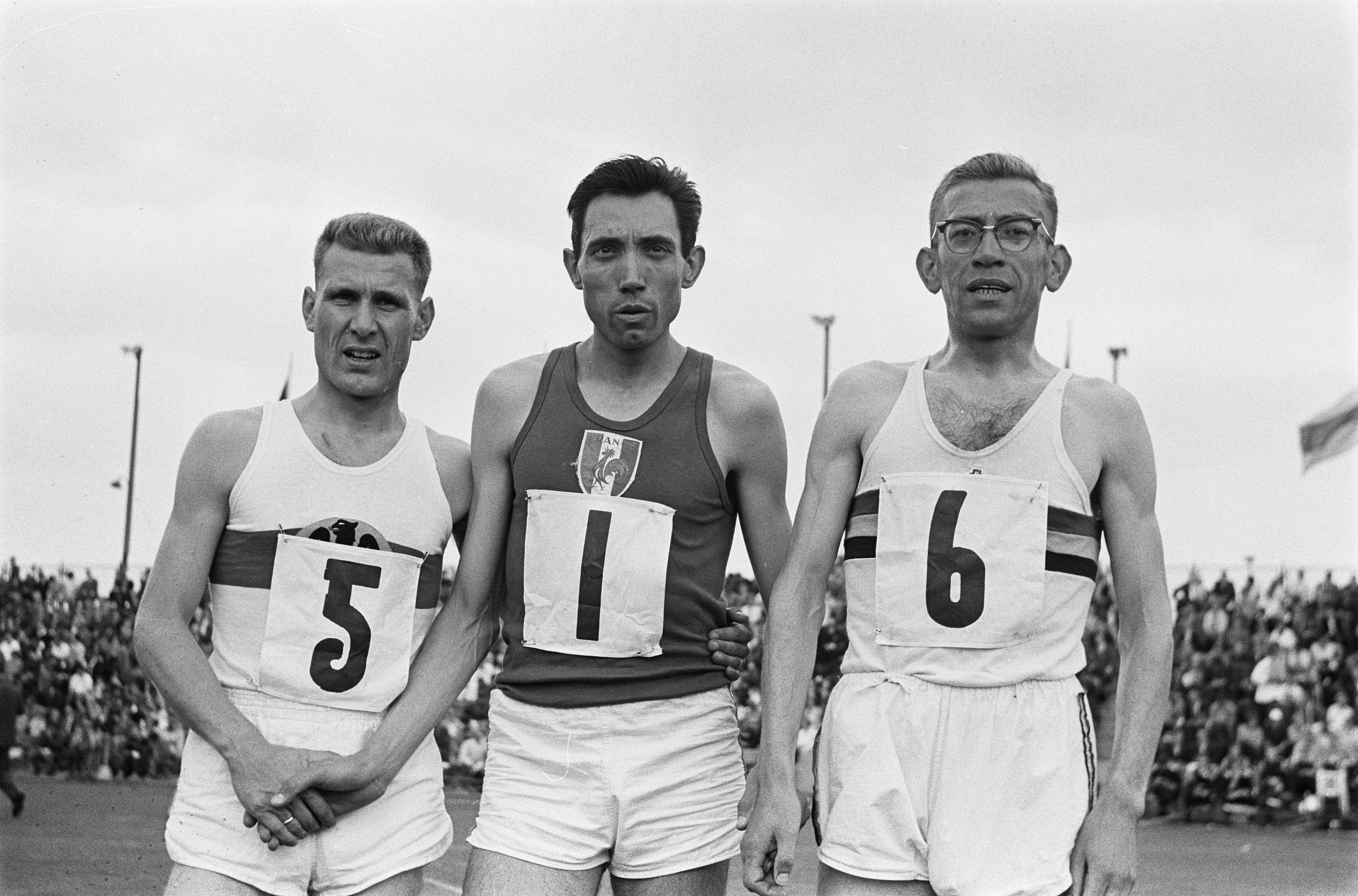 Collectie / Archief : Fotocollectie Anefo Reportage / Serie : Zes Landen Atletiek in Enschede Beschrijving : Lopers 5000 meter: Wolfgang Frincke (Duitsland), Michel Bernard (Frankrijk), Hedwig Leenaert (België) Annotatie : [neg.nr. 19] Datum : 13 juli 1963 Locatie : Enschede Trefwoorden : atletiek, sport Persoonsnaam : Bernard, Michel, Frincke, [...], Leenaert, Hedwig Instellingsnaam : Zes Landen Athletiek Fotograaf : Eric Koch / Anefo, [onbekend] Auteursrechthebbende : Nationaal Archief Materiaalsoort : Negatief (zwart/wit) Nummer archiefinventaris : bekijk toegang 2.24.01.05 Bestanddeelnummer : 915-3552